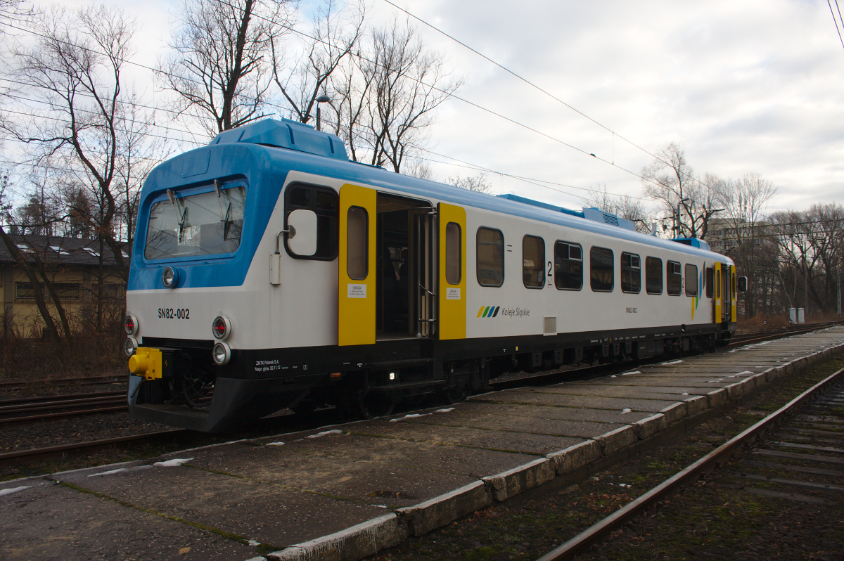 KŚ44123 kończy bieg na stacji Cieszyn. 17 grudnia 2012